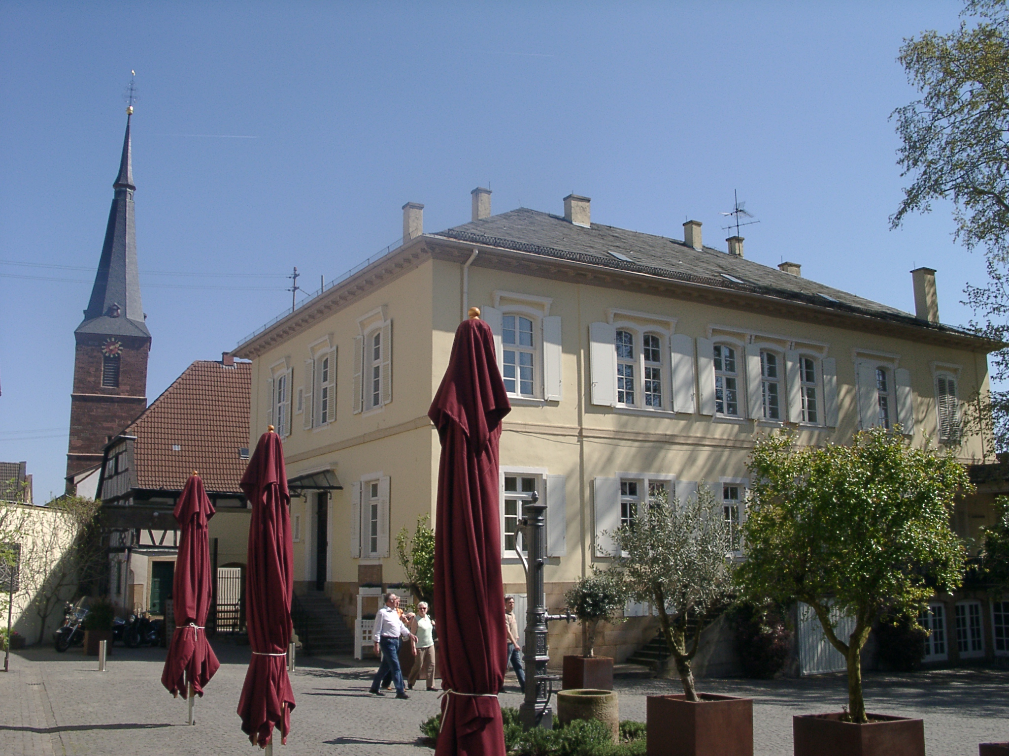 Das Herrenhaus des Ketschauer Hofes, Deidesheim, entworfen vom Koblenzer Architekten Hermann Nebel